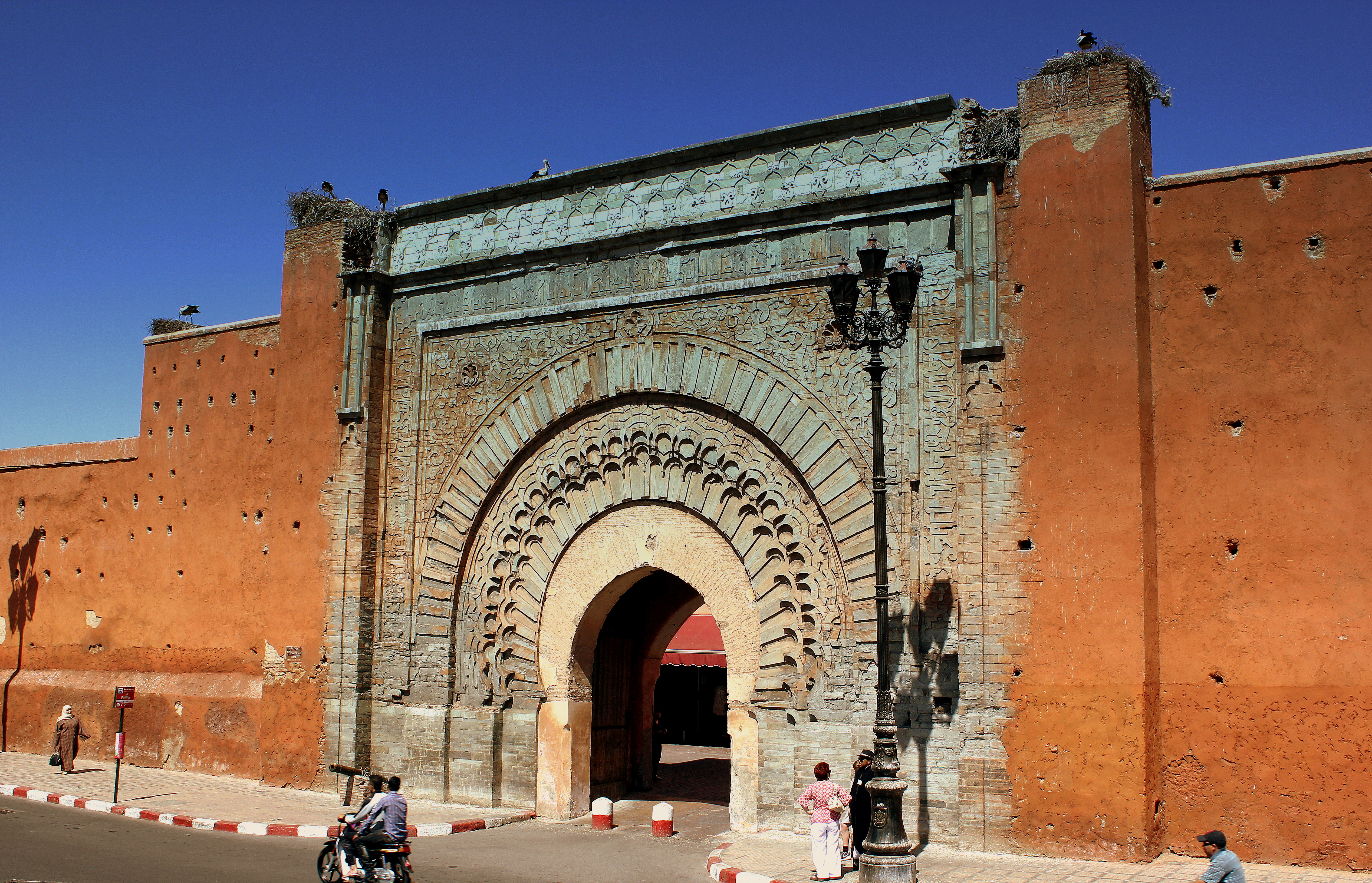 CITY WALLS MARRAKECH MOROCCO APRIL 2013